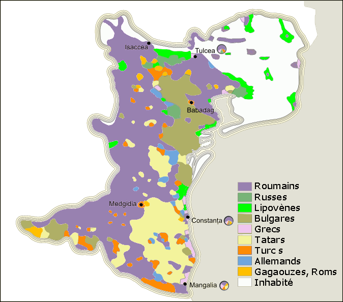 Carte des langues majoritaires de Dobrogée (Dobroudja) en 1903, traduction en français et adaptation d'après la carte roumaine d'Asybaris01.